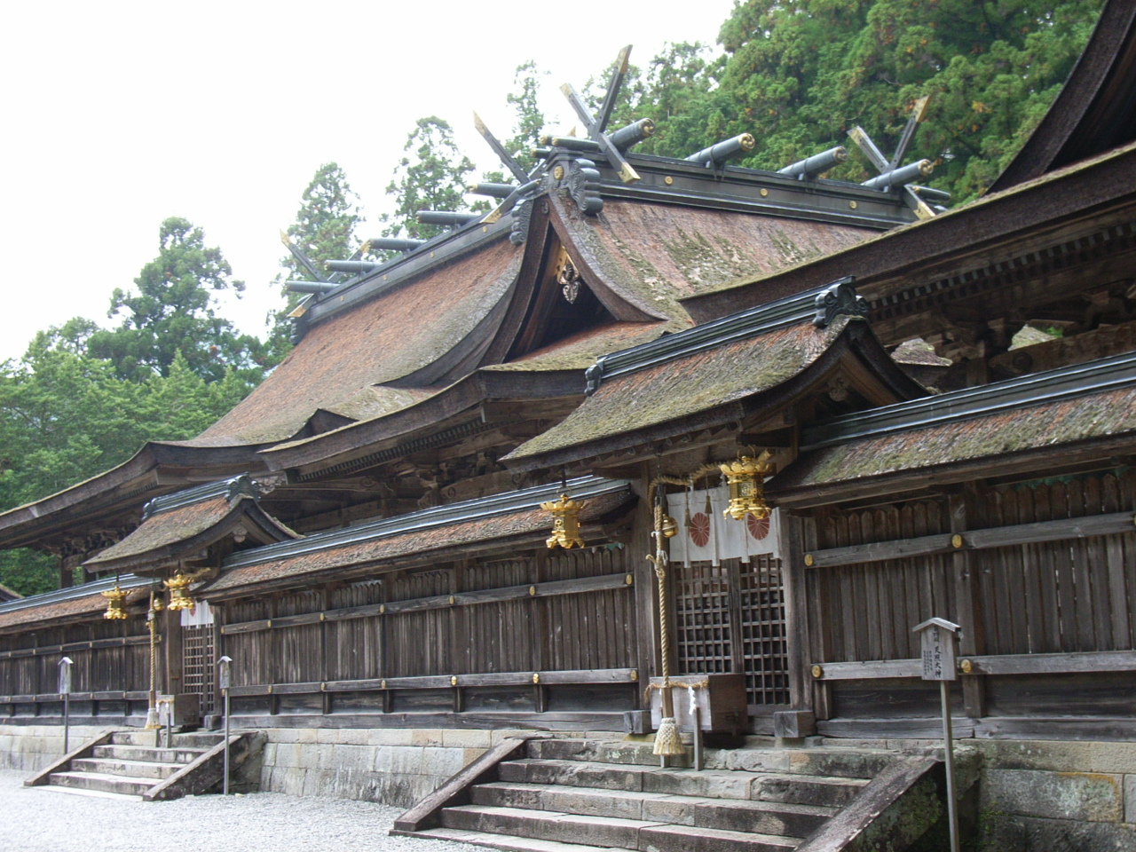 Kumano Hongu Taisha in Japan